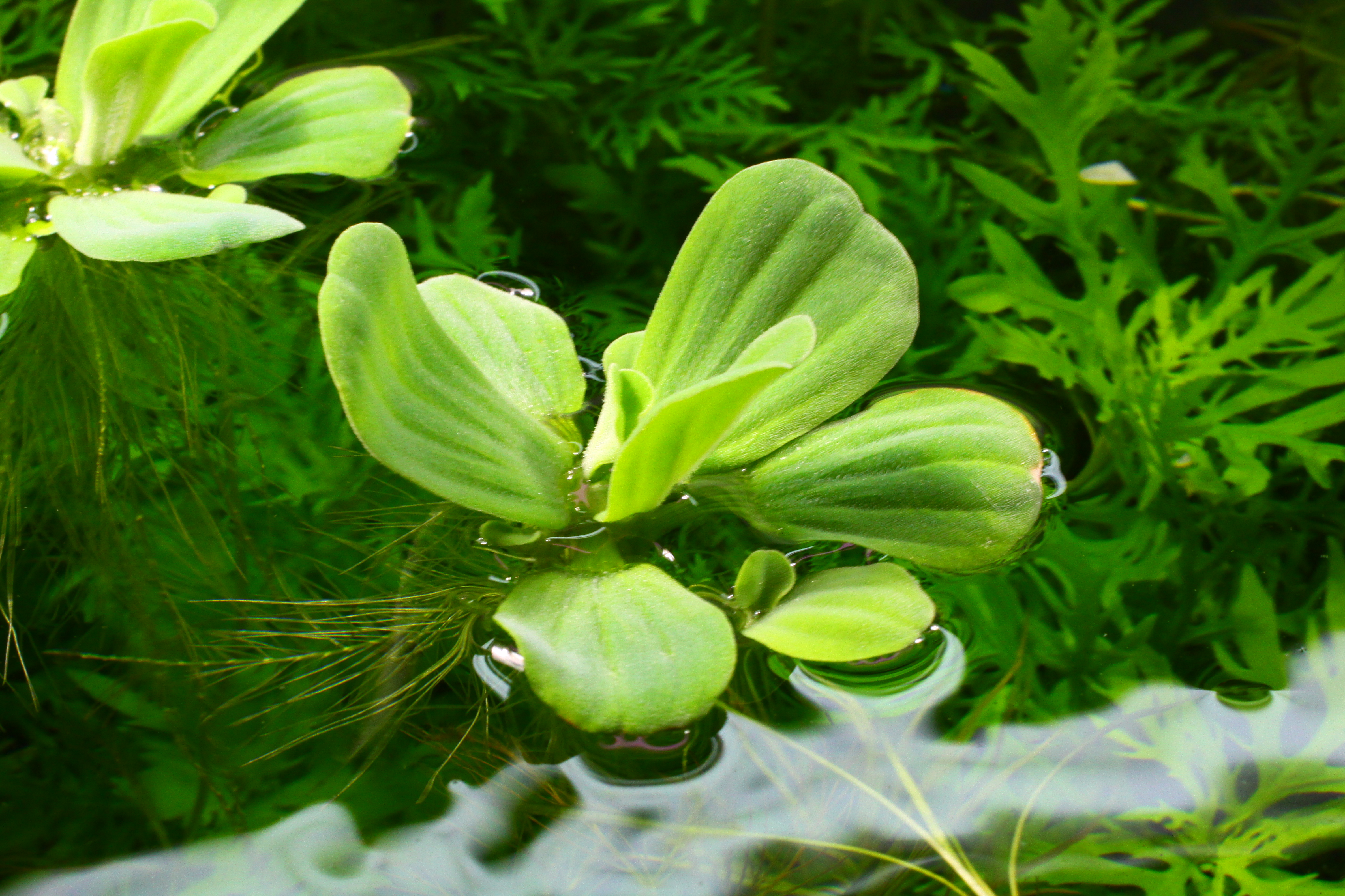 Pistia rozetkowa